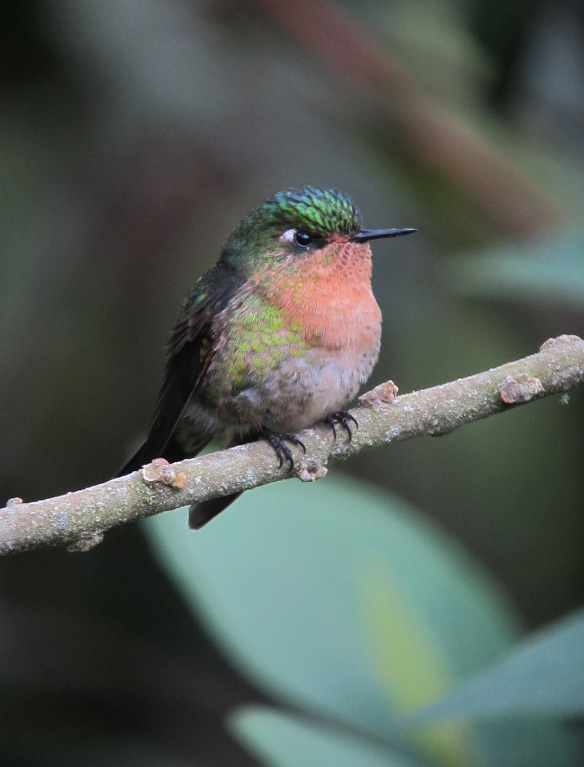 Sonsón, Antioquia, Colombia